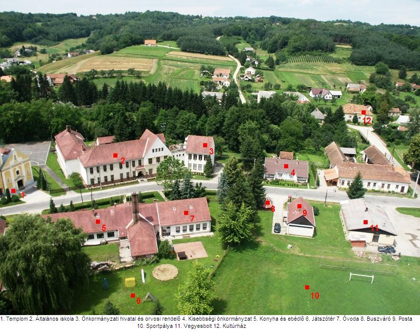 A felsőszölnöki faluközpont a fontosabb intézmények jelölésével